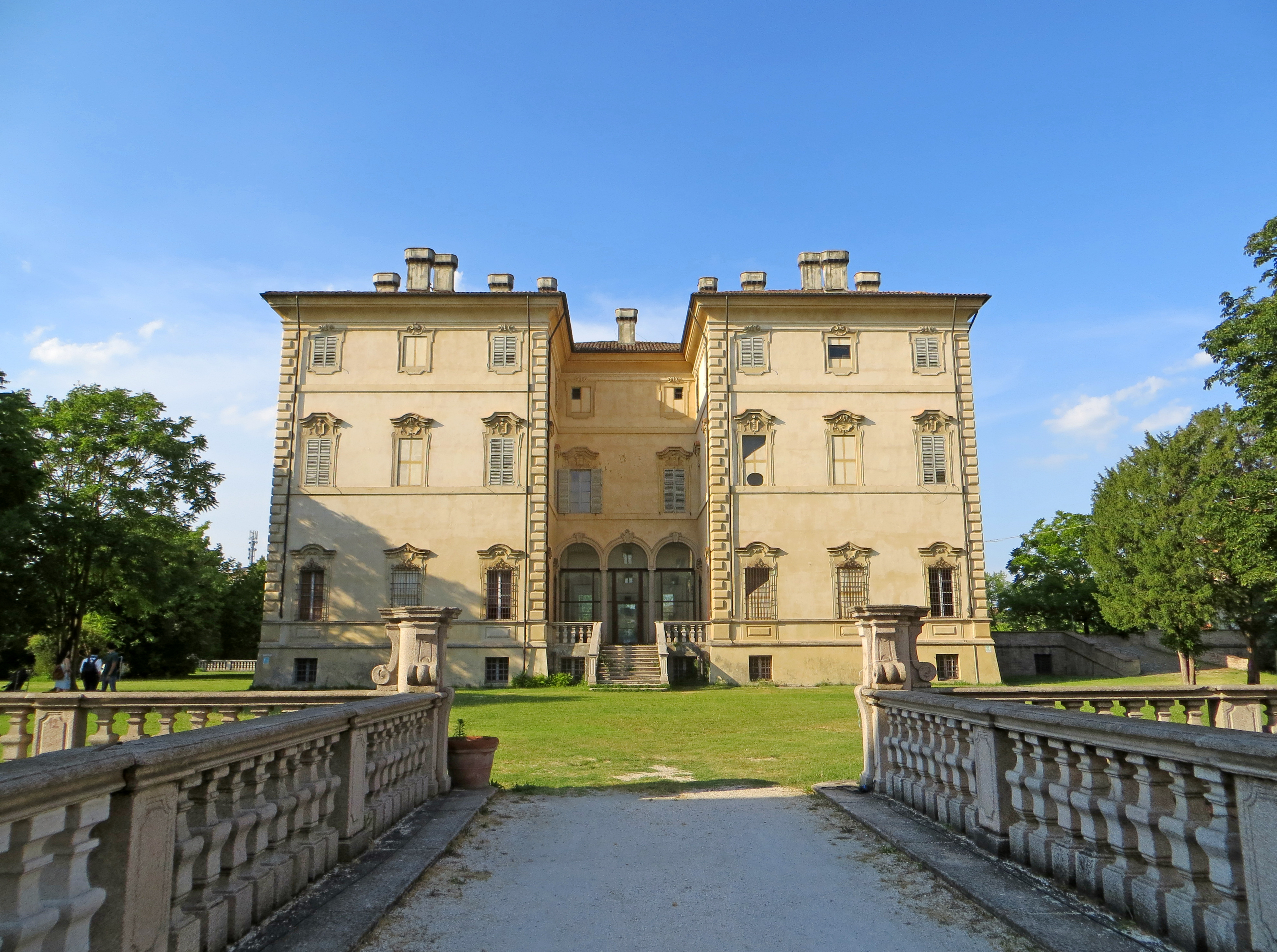 Villa Pallavicino (Busseto) - facciata sud This is a photo of a monument which is part of cultural heritage of Italy.